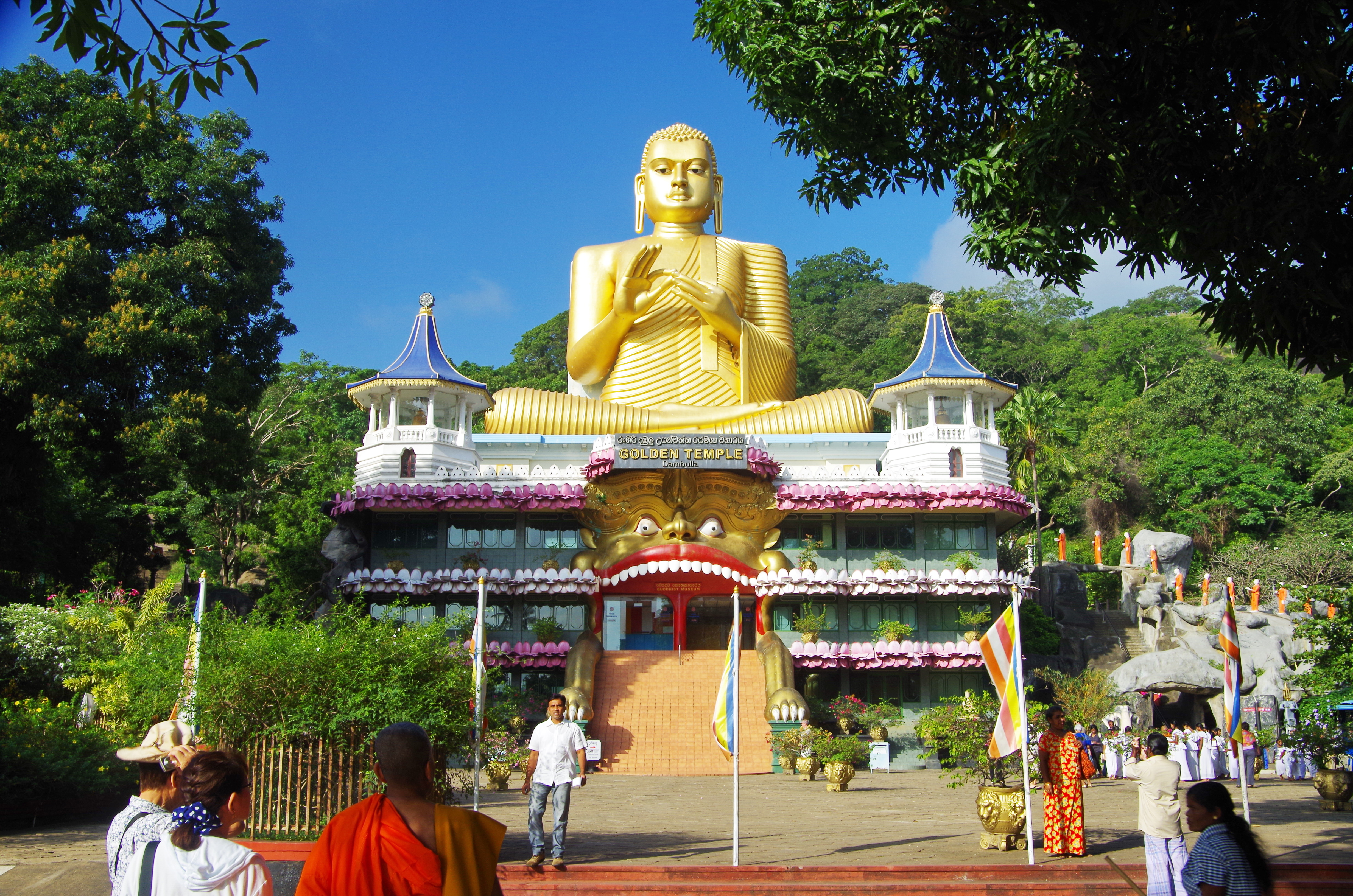 Goldener Tempel Dambulla